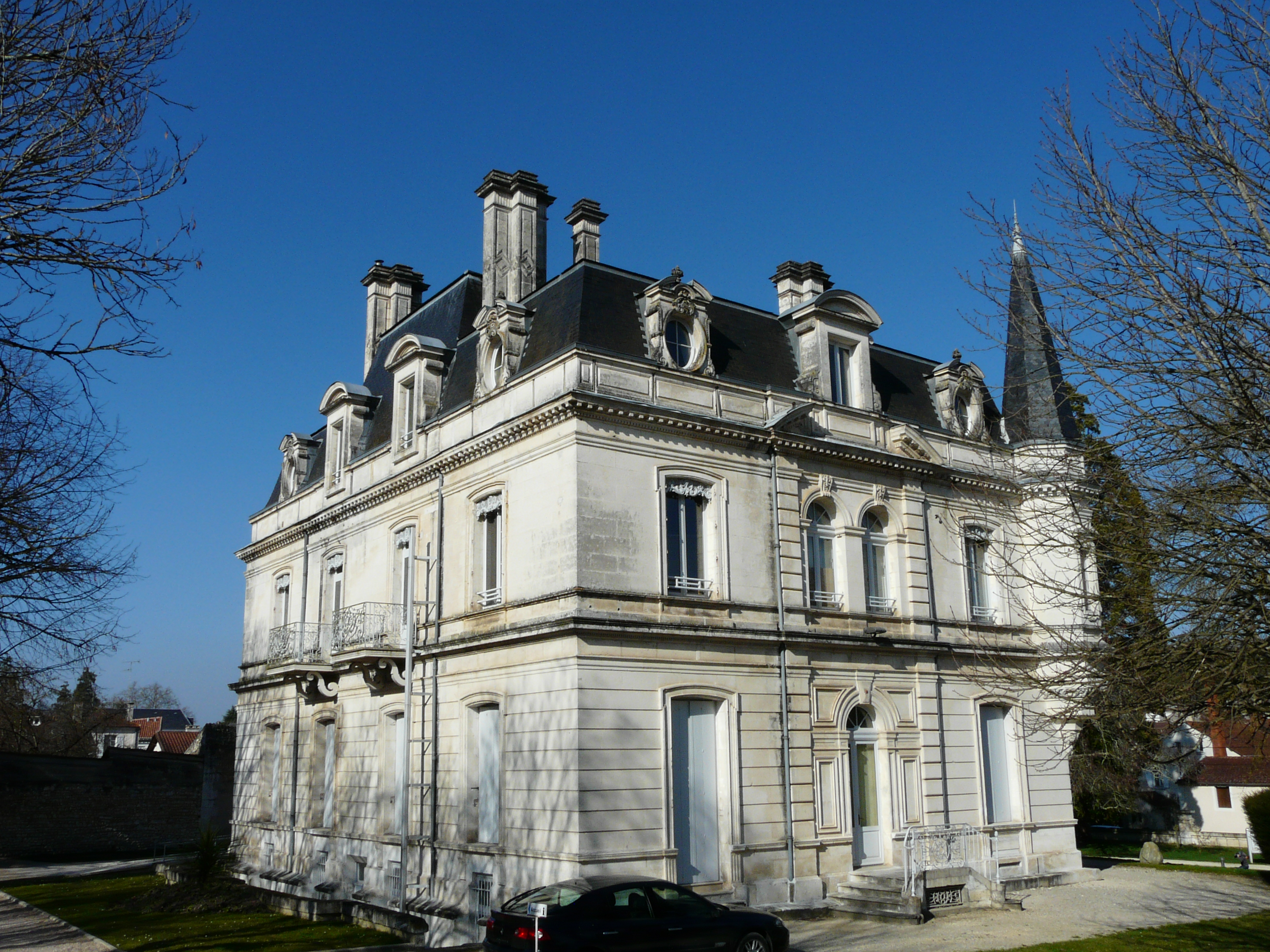 L'angle sud-ouest de la mairie de Ribérac, Dordogne, France.